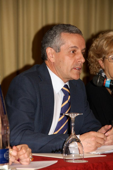 Emilio Gutierrez durante un acto en León